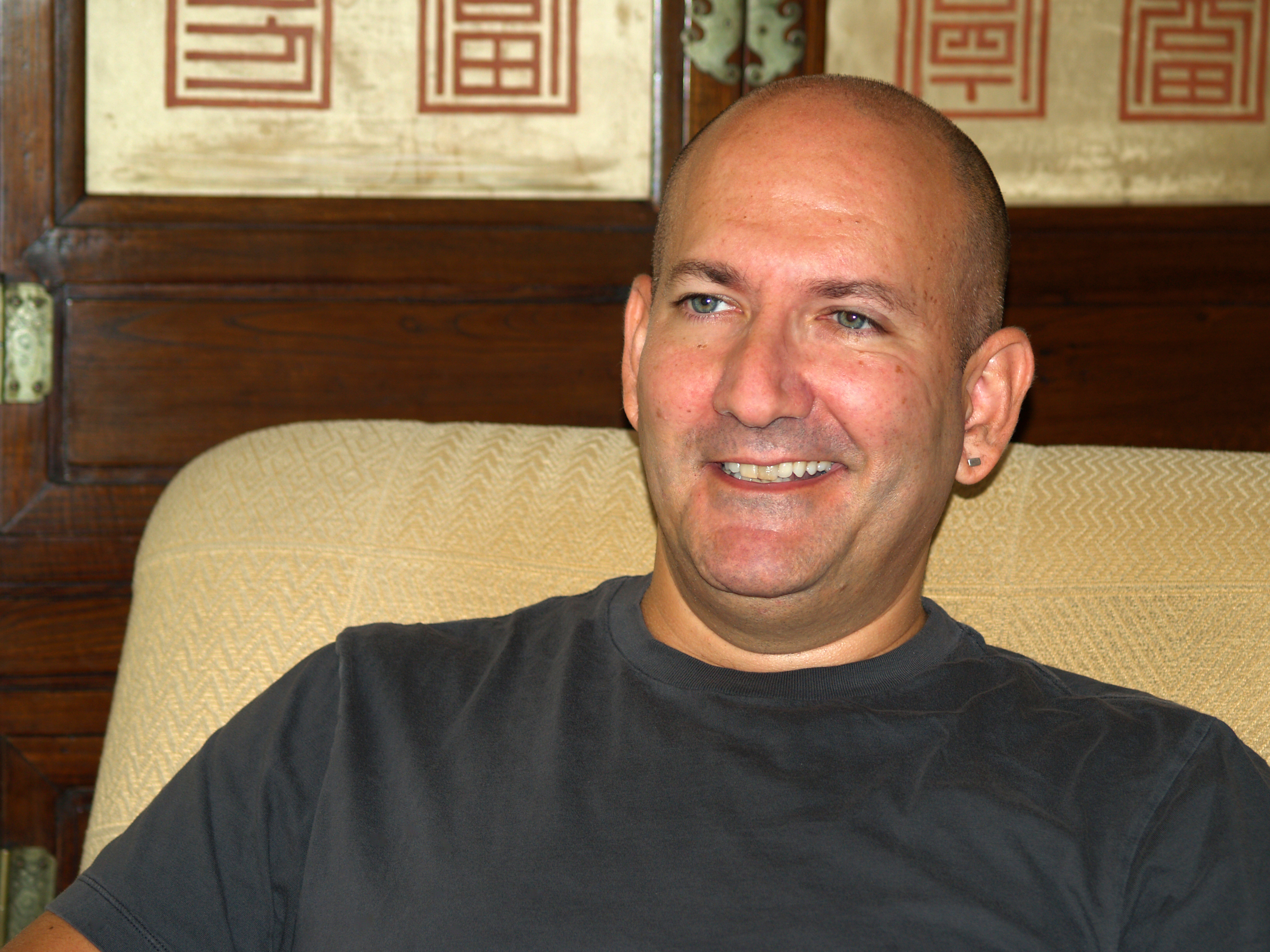 Ed Sikov